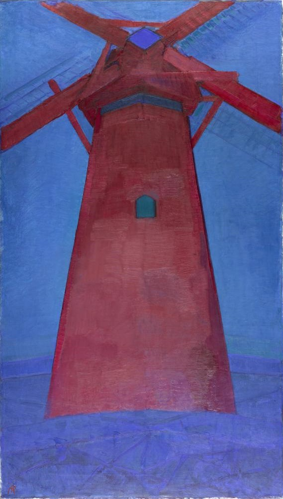 Zicht op de Rode Molen van Piet Mondriaan, 1911, in het Kunstmuseum Den Haag in Den Haag